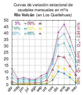 Curas de variación estacional del río Volcán en Los Queltehues. # cita publicación #| apellido = Dirección General de Aguas #| nombre = #| enlace-autor = Ministerio de Obras Públicas (Chile) #| título = Diagnóstico y clasificación de los cursos y cuerpos de agua según objetivos de calidad. Cuenca del río Maipo #| ubicación = Santiago de Chile #| editorial = Ministerio de Obras Públicas (Chile) #| año = 2004 #| edición = #| url = #| urlarchivo = #| fechaarchivo = #| ref = harv # Tabla 4.2: Estación Volcán en Los Queltehues pág. 54 mes 5% 10% 20% 50% 85% 95% abr 12.50 8.50 5.33 2.19 0.73 0.38 may 4.63 3.36 2.30 1.17 0.59 0.44 jun 5.61 4.14 2.86 1.42 0.60 0.36 jul 4.43 3.46 2.57 1.45 0.72 0.48 ago 4.05 3.39 2.71 1.68 0.76 0.35 sep 6.94 5.10 3.52 1.73 0.72 0.43 oct 8.98 7.48 5.89 3.49 1.58 0.90 nov 20.04 18.23 16.03 11.83 6.66 3.63 dic 40.74 36.04 30.79 22.17 13.98 10.30 ene 47.00 39.71 32.27 21.44 12.51 8.85 feb 36.80 29.95 23.34 14.49 8.06 5.71 mar 22.10 18.04 13.80 7.62 3.01 1.53 This plot was created with Gnuplot.